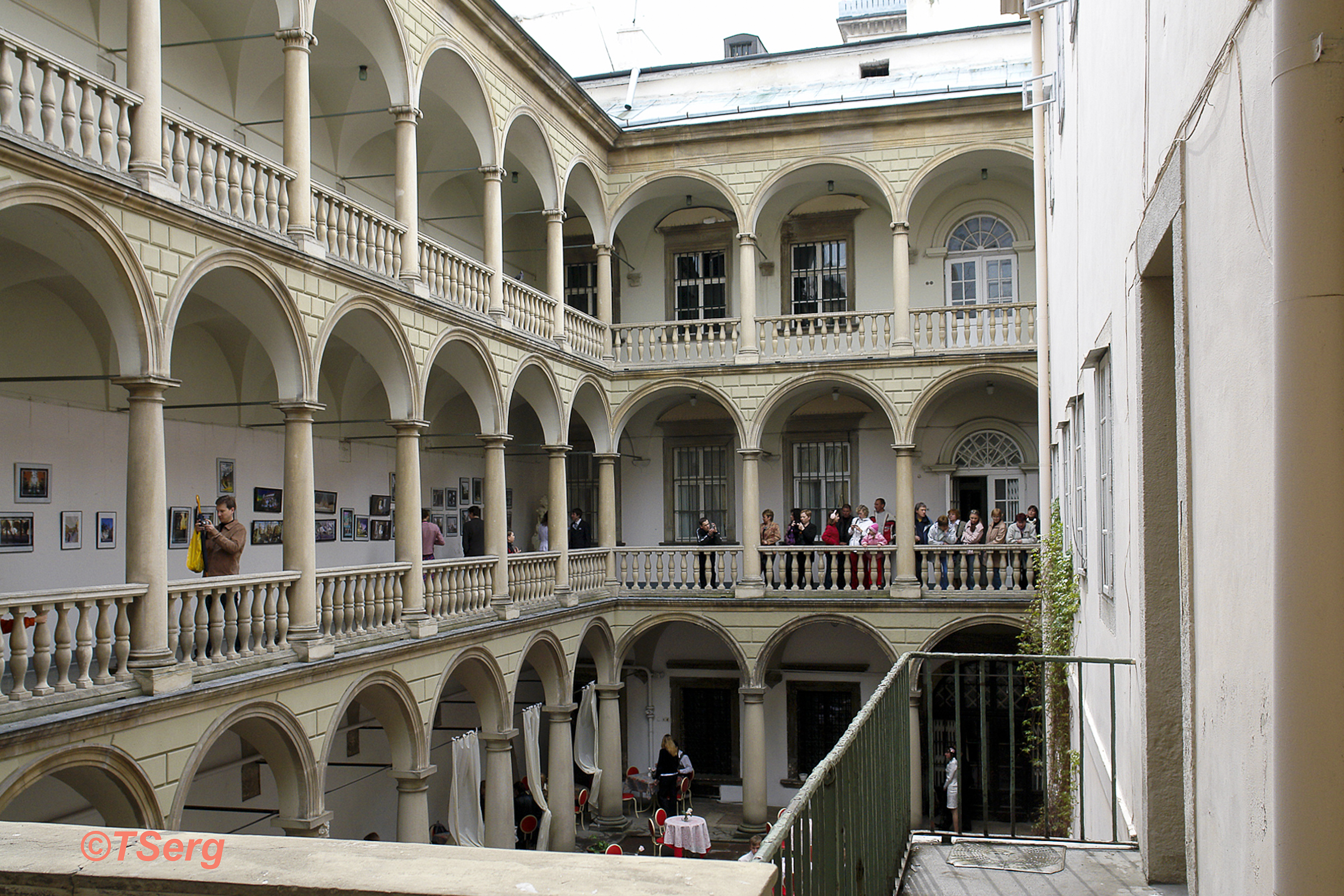 Львів. Історичний музей, Італійський дворик .